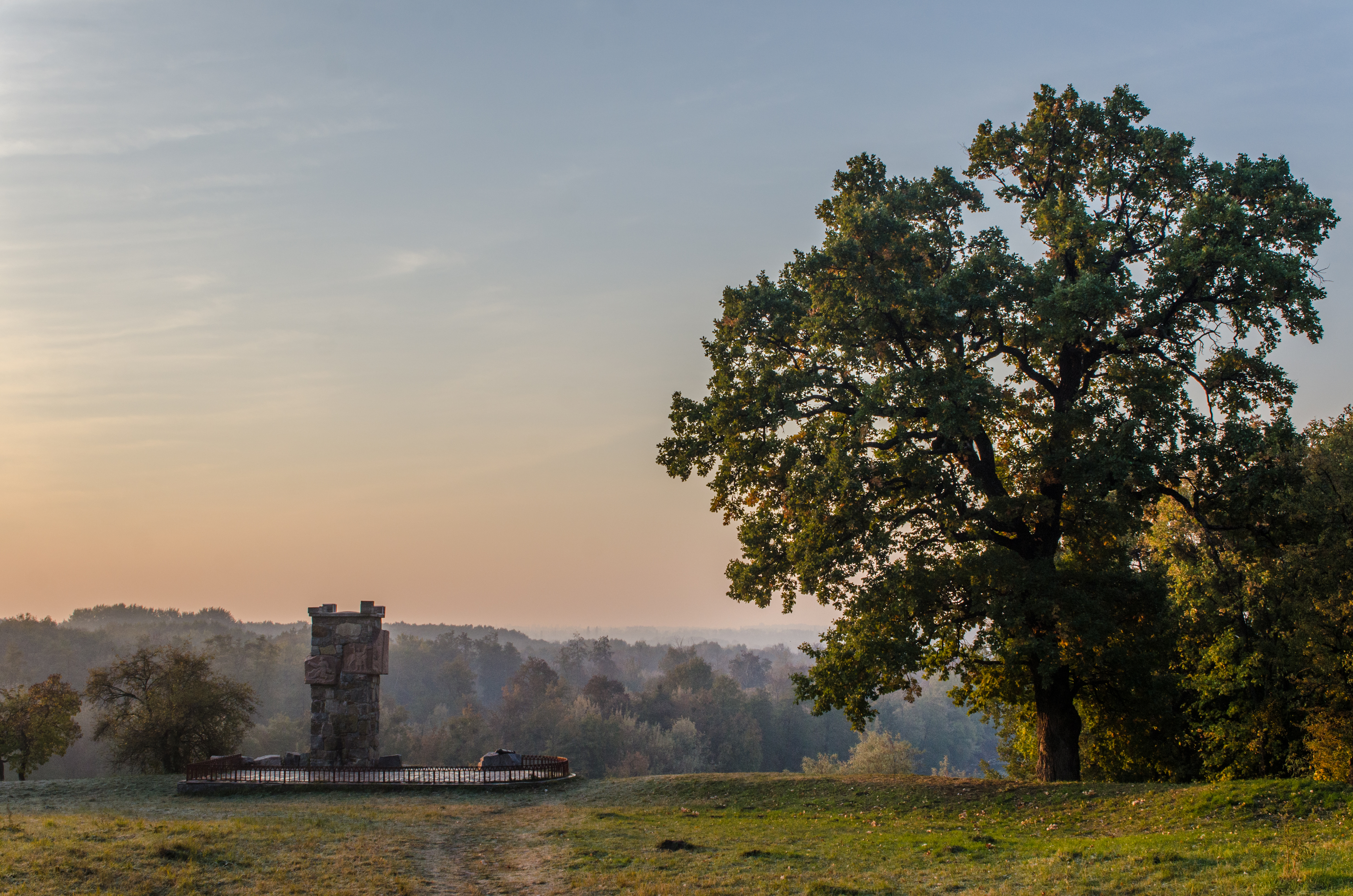 Дуб Семена Палія, м. Біла Церква, Національний дендрологічний парк «Олександрія»